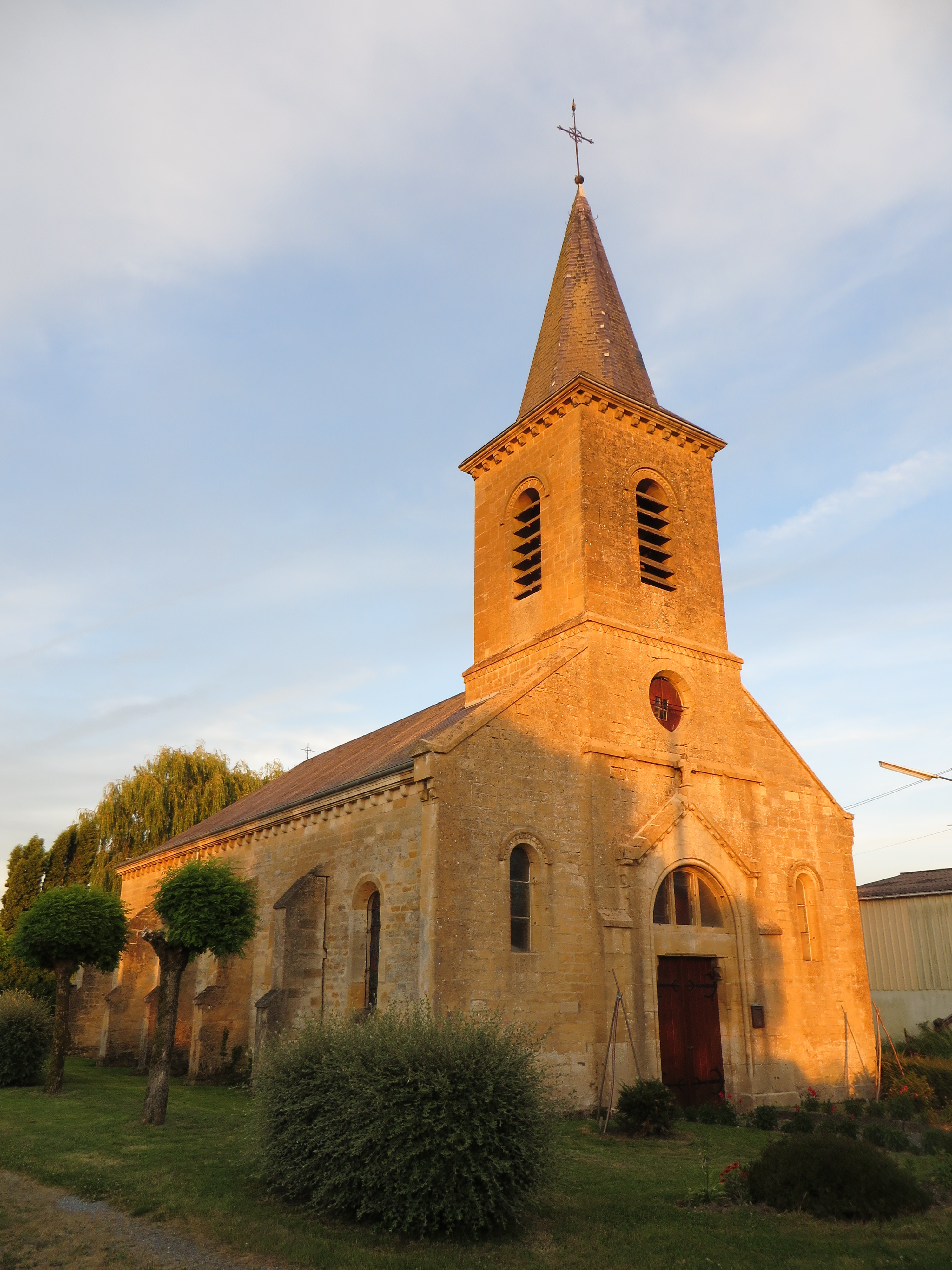 Saulmory-et-Villefranche L'église Saint-Denis de Villefranche